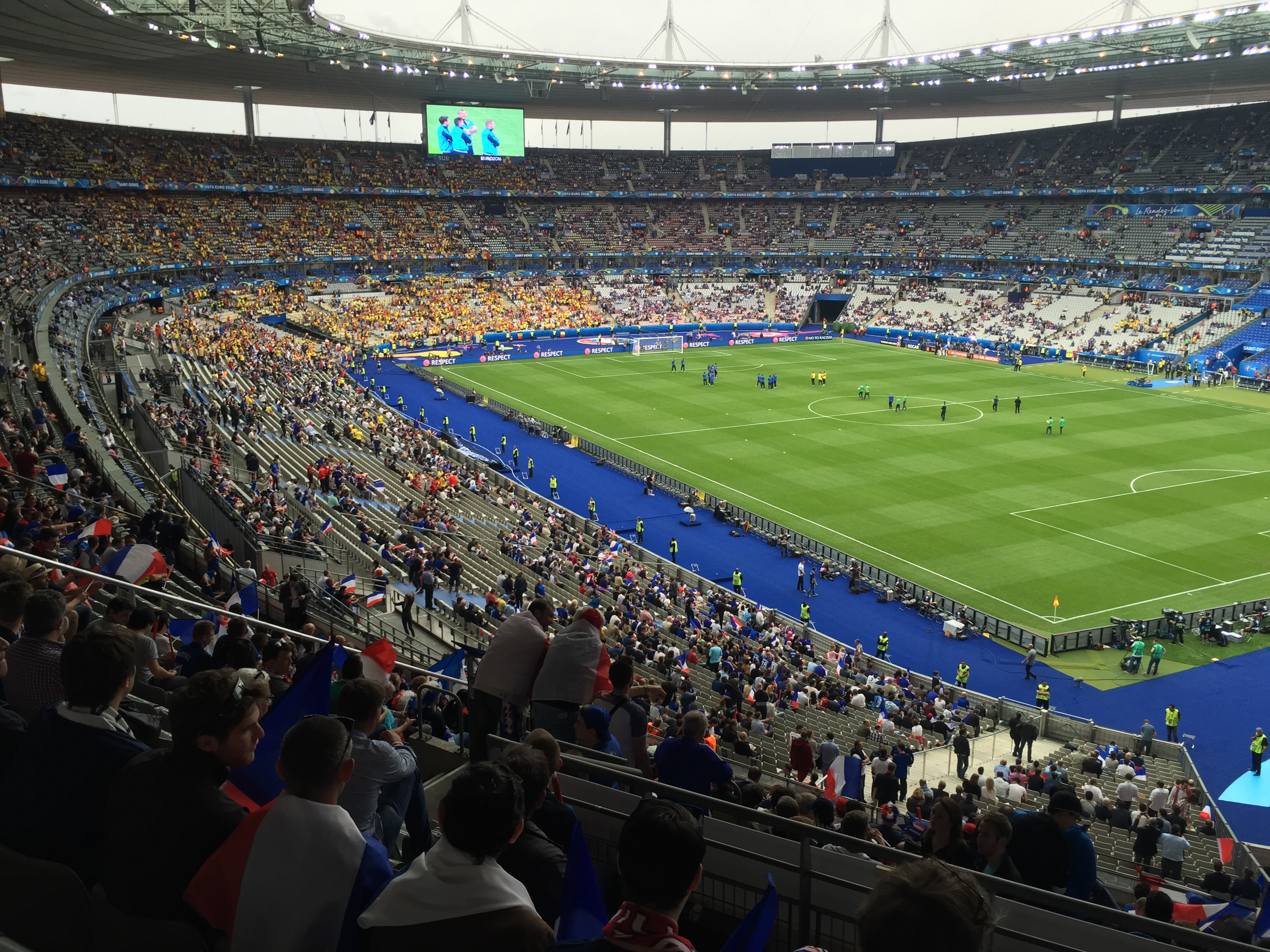 Euro 2016 stade de France France-Roumanie